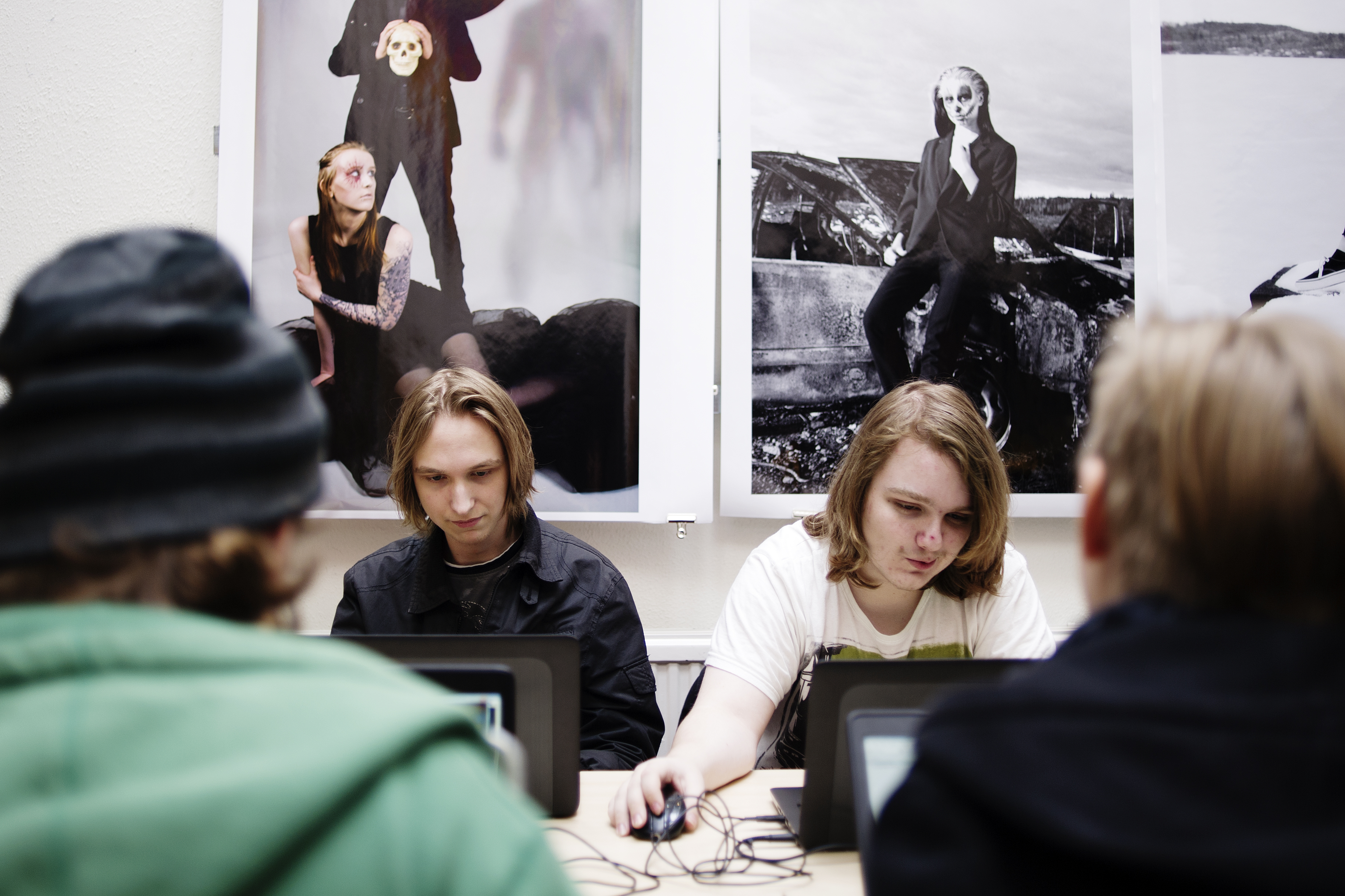 Våra kreativa skolor är för dug som vill jobba i framtidens kreativa branscher.